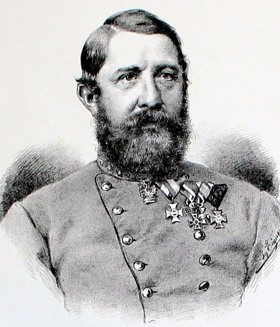 Adolf Freiherr von Catty 1875